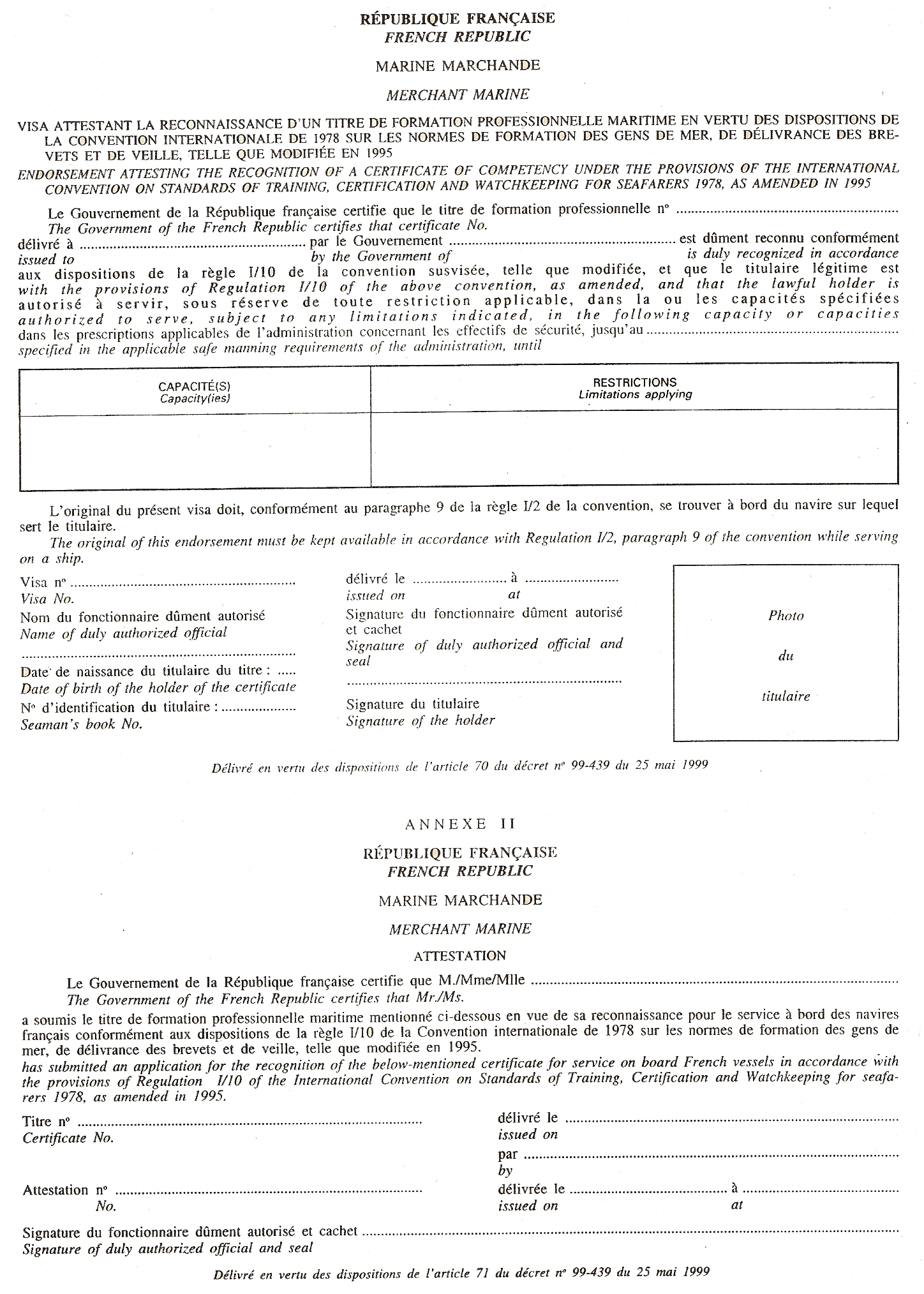 Titre de formation professionnelle maritime en 1999